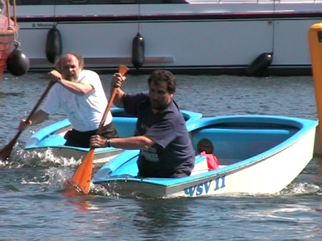 Optirennen Mueritzsail